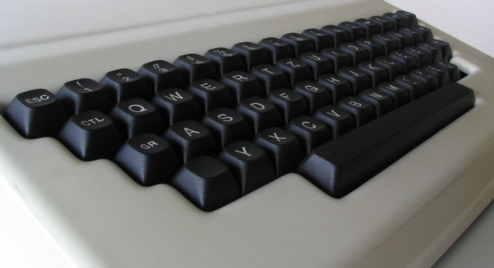 Galeb, tipkovnica